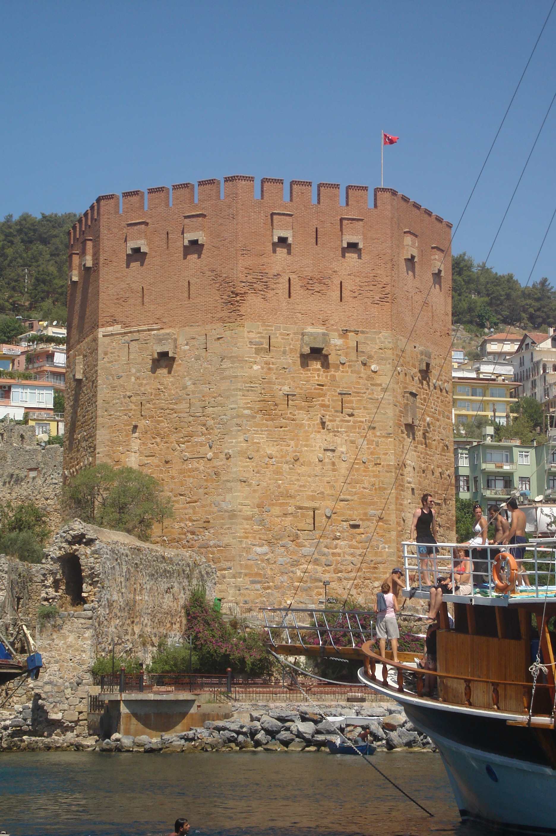 Kızıl Kule (Red Tower) in Alanya, Turkey. Built 1226.